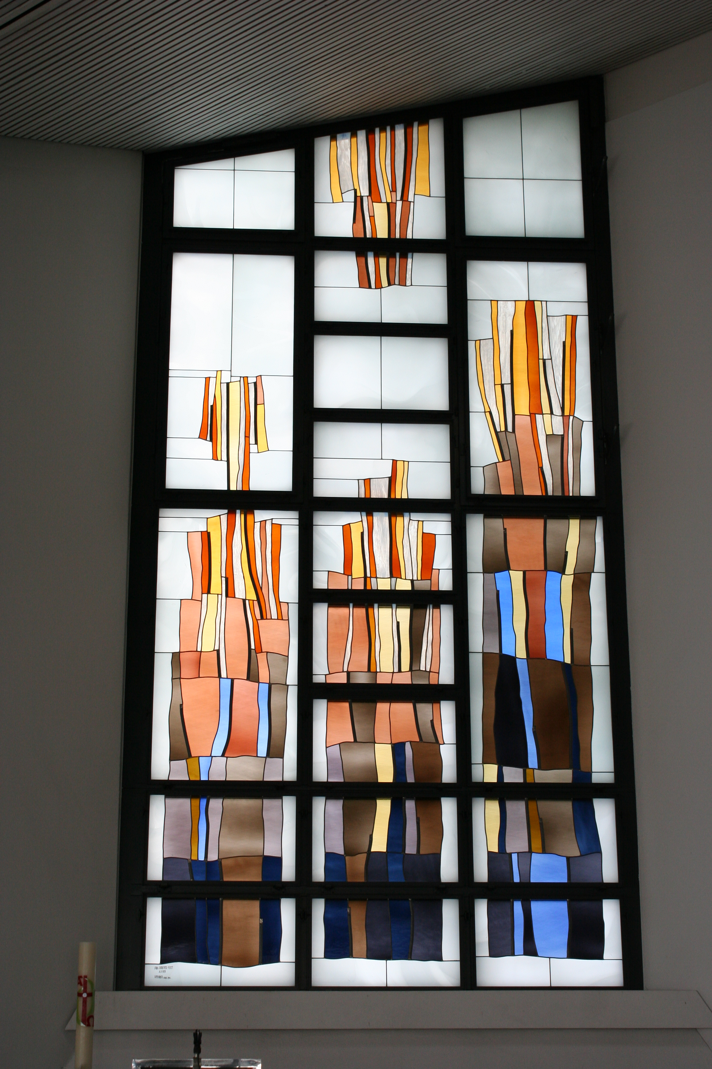 Römisch-katholische Kirche St. Franziskus Maur-Ebmatingen, Glasfenster von Fra Roberto Pasotti, Kloster Bigorio